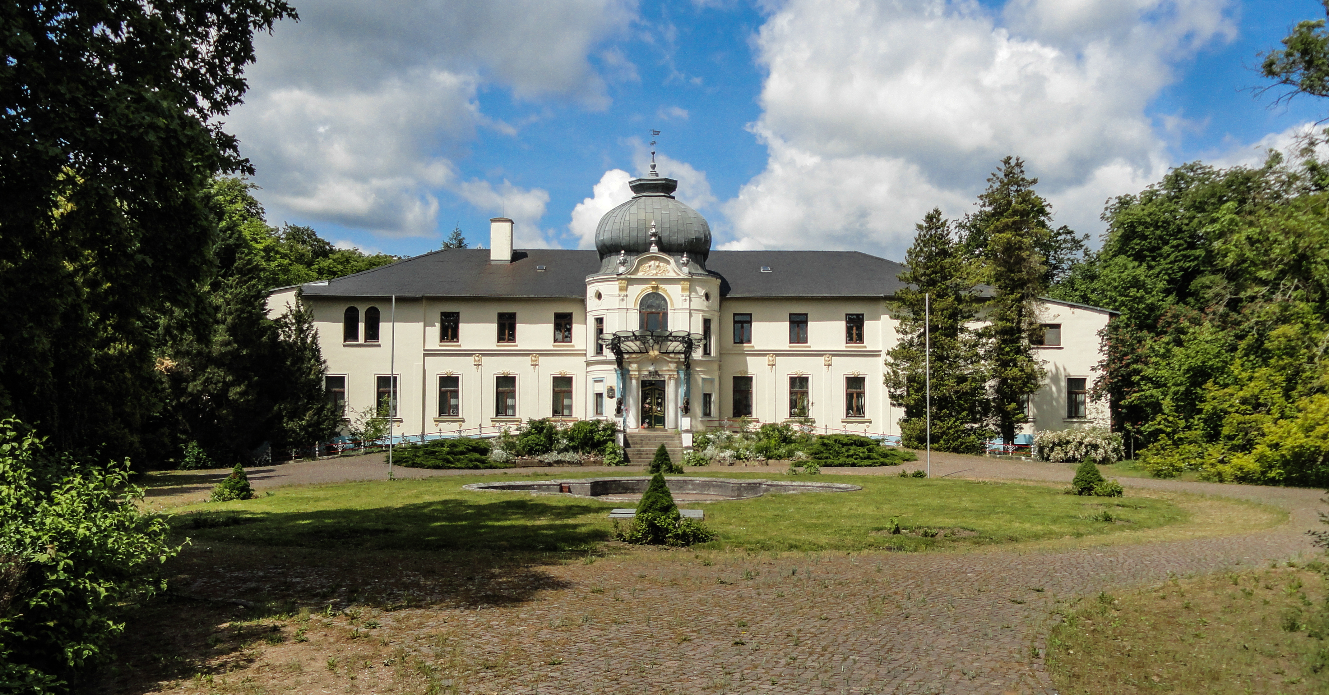 Das Schluss der Gutsanlage Blücherhof in 17194 Klocksin